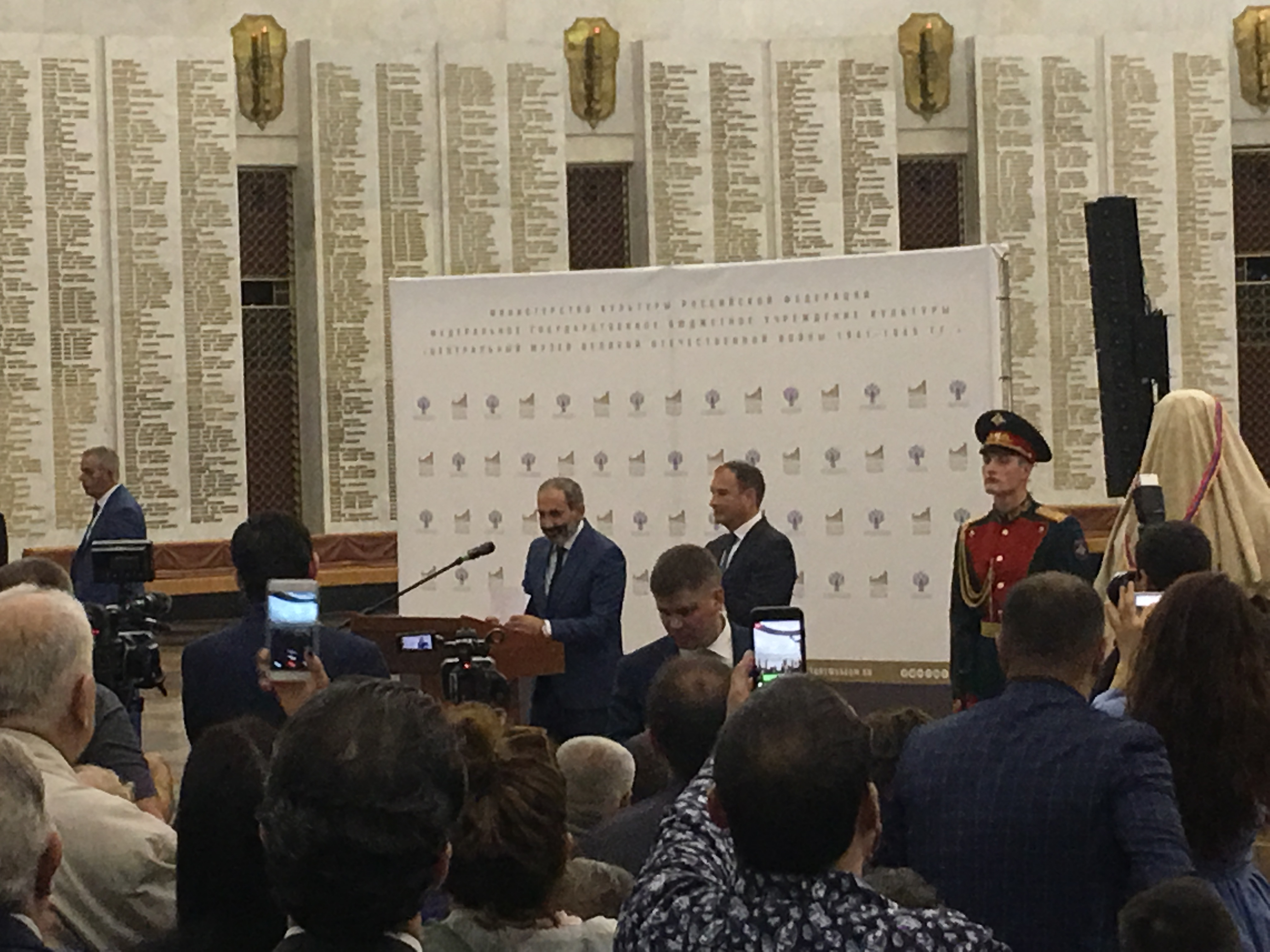 Նիկոլ Փաշինյանը Հաղթանակի թանգարանում, Մոսկվա, 2018 թվականի հունիսի 14